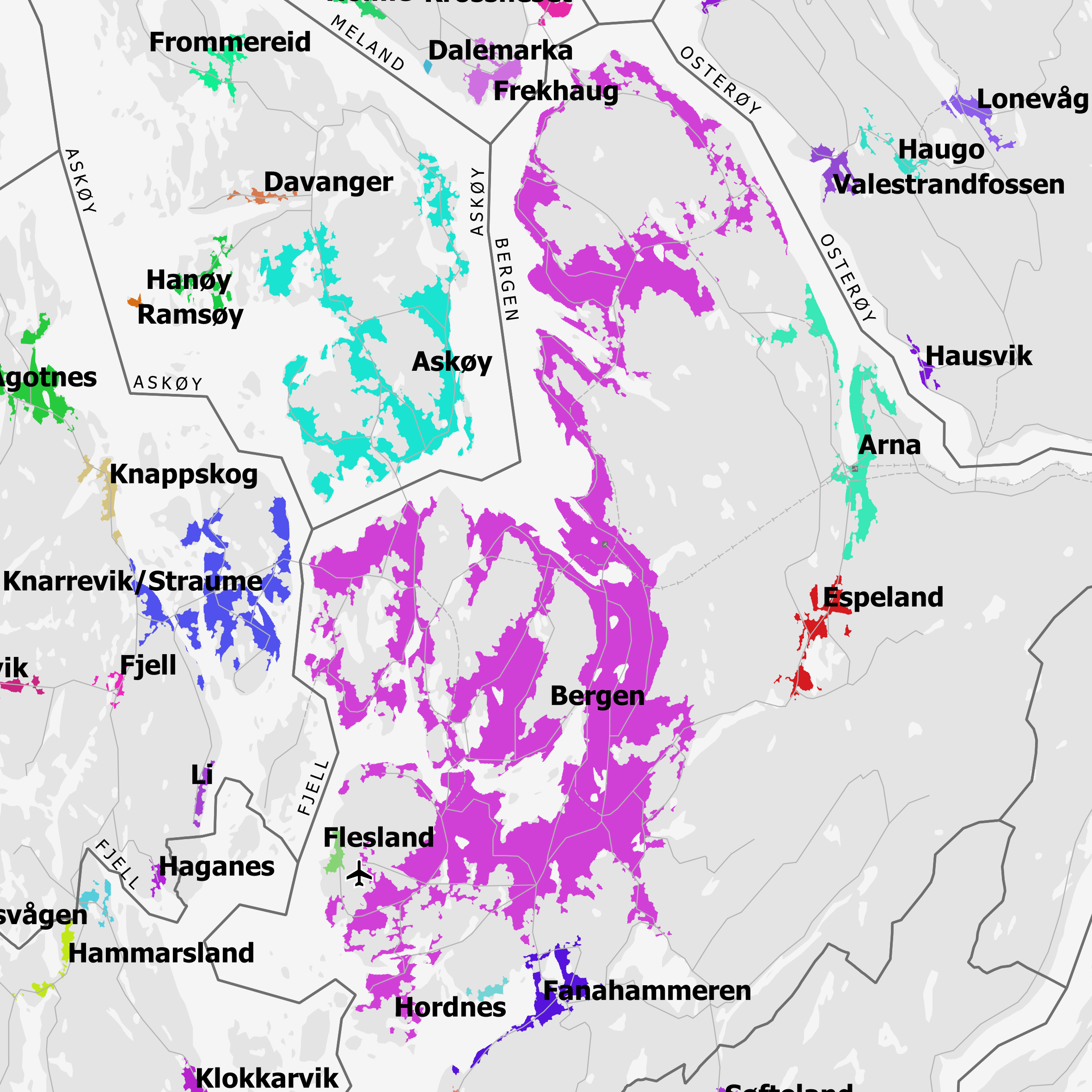 Tettsted 5001 Bergen pr. 1.1.2018